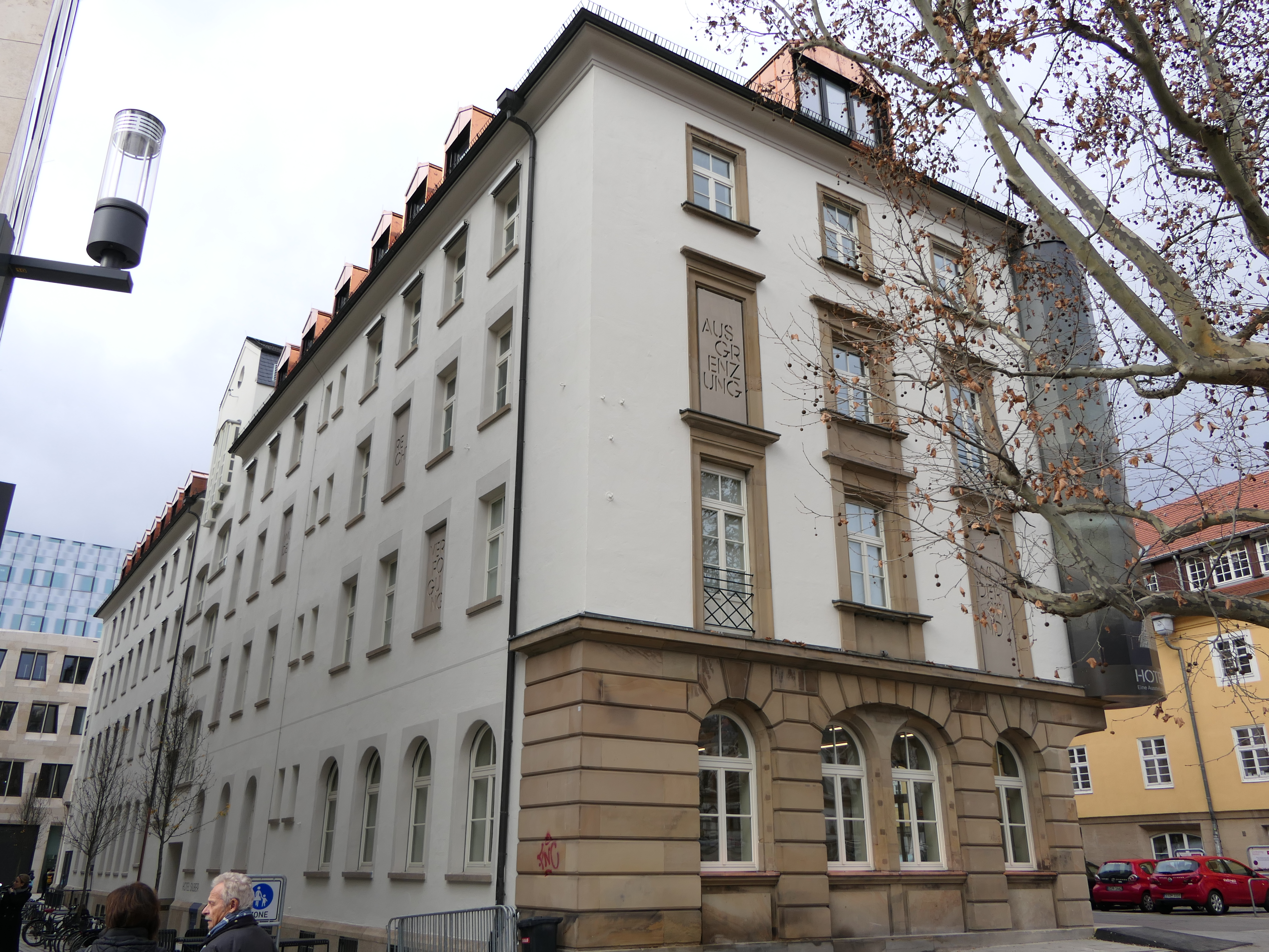 Das Hotel Silber nach seinem Umbau. Rückseite.